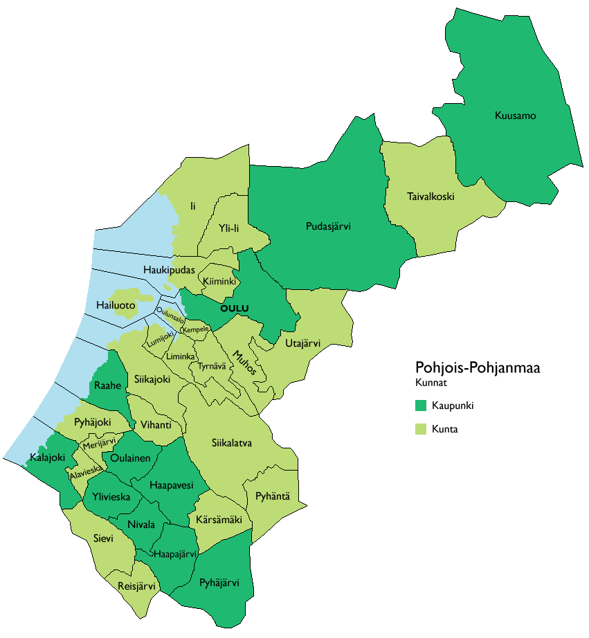 Kartta Pohjois-Pohjanmaan kunnista.